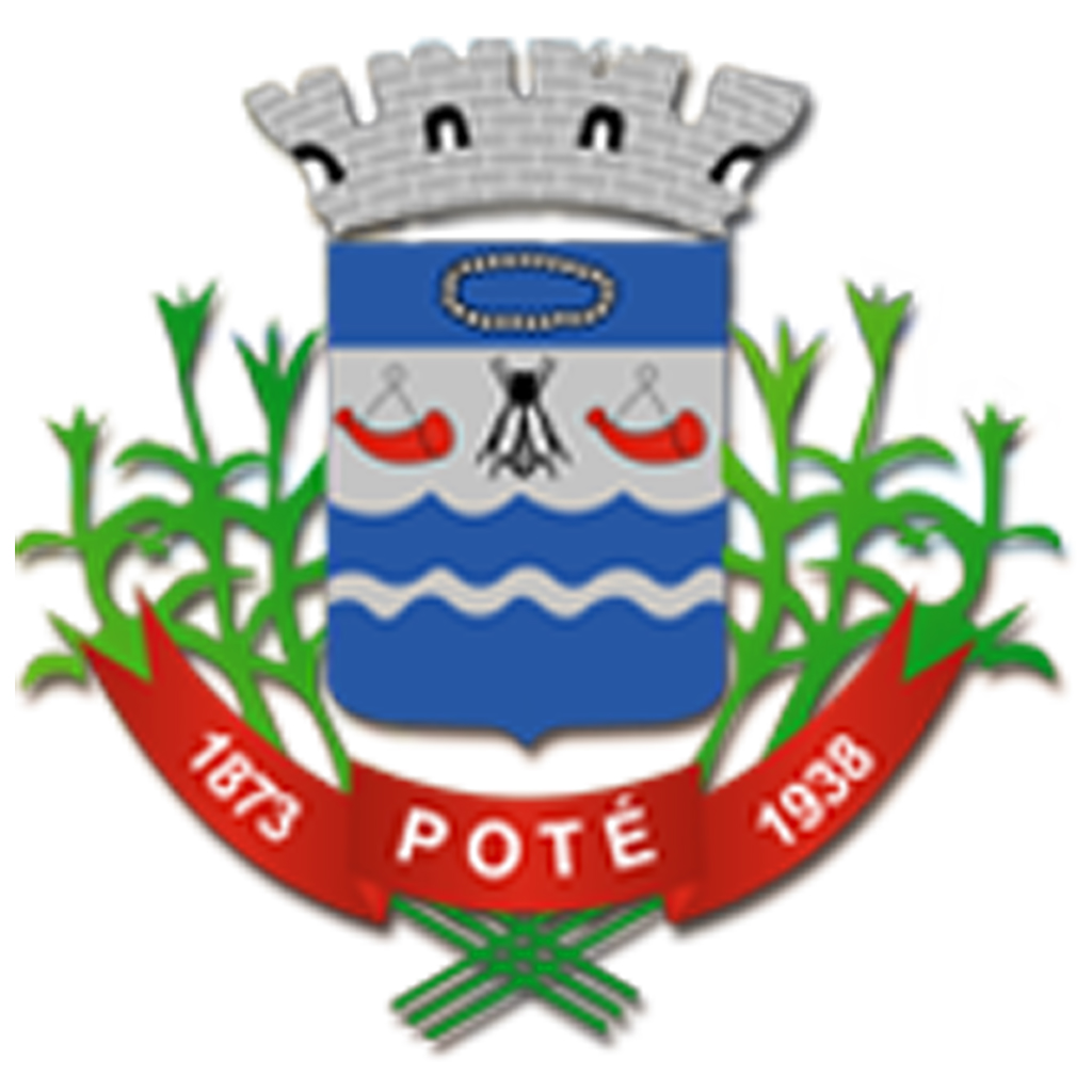 brasão da cidade de Poté